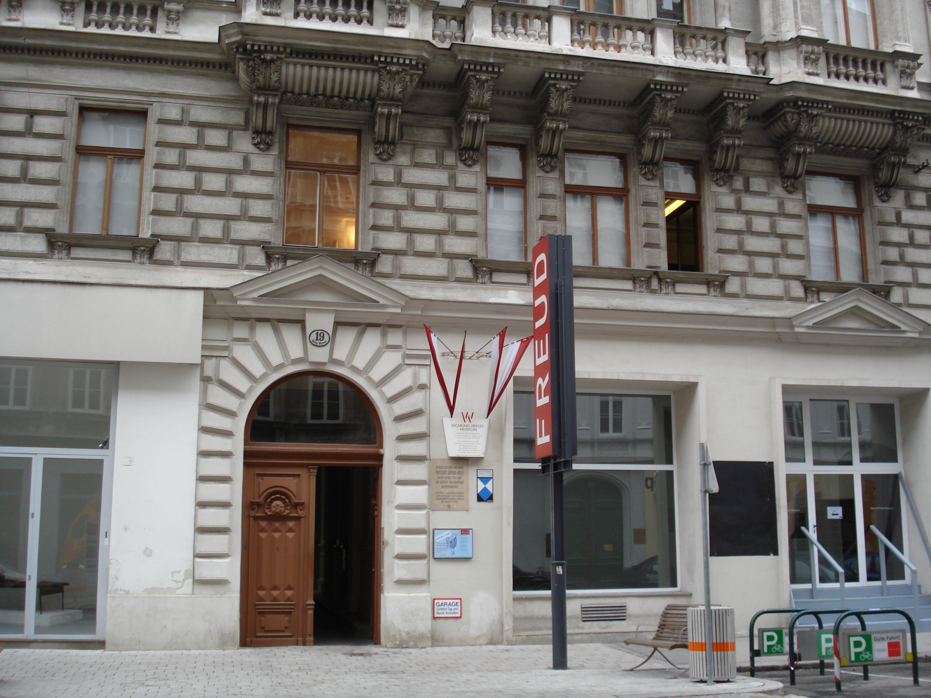 Freud egykori lakhelye Bécsben, a Berggasse 19. alatt ma múzeum (Bécs)